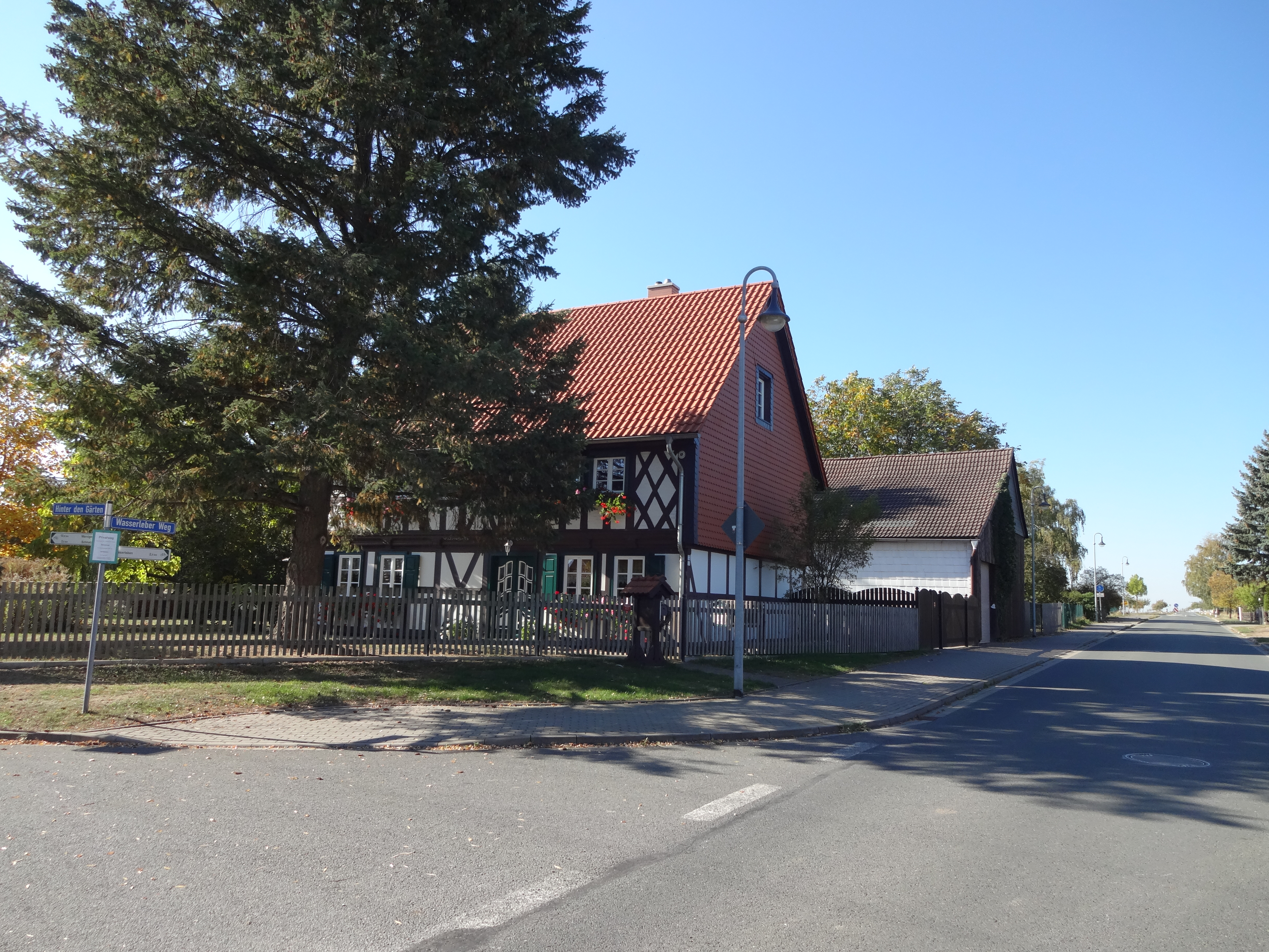 denkmalgeschütztes Bauernhaus im Wasserleber Weg 1 in Langeln (Gemeinde Nordharz)